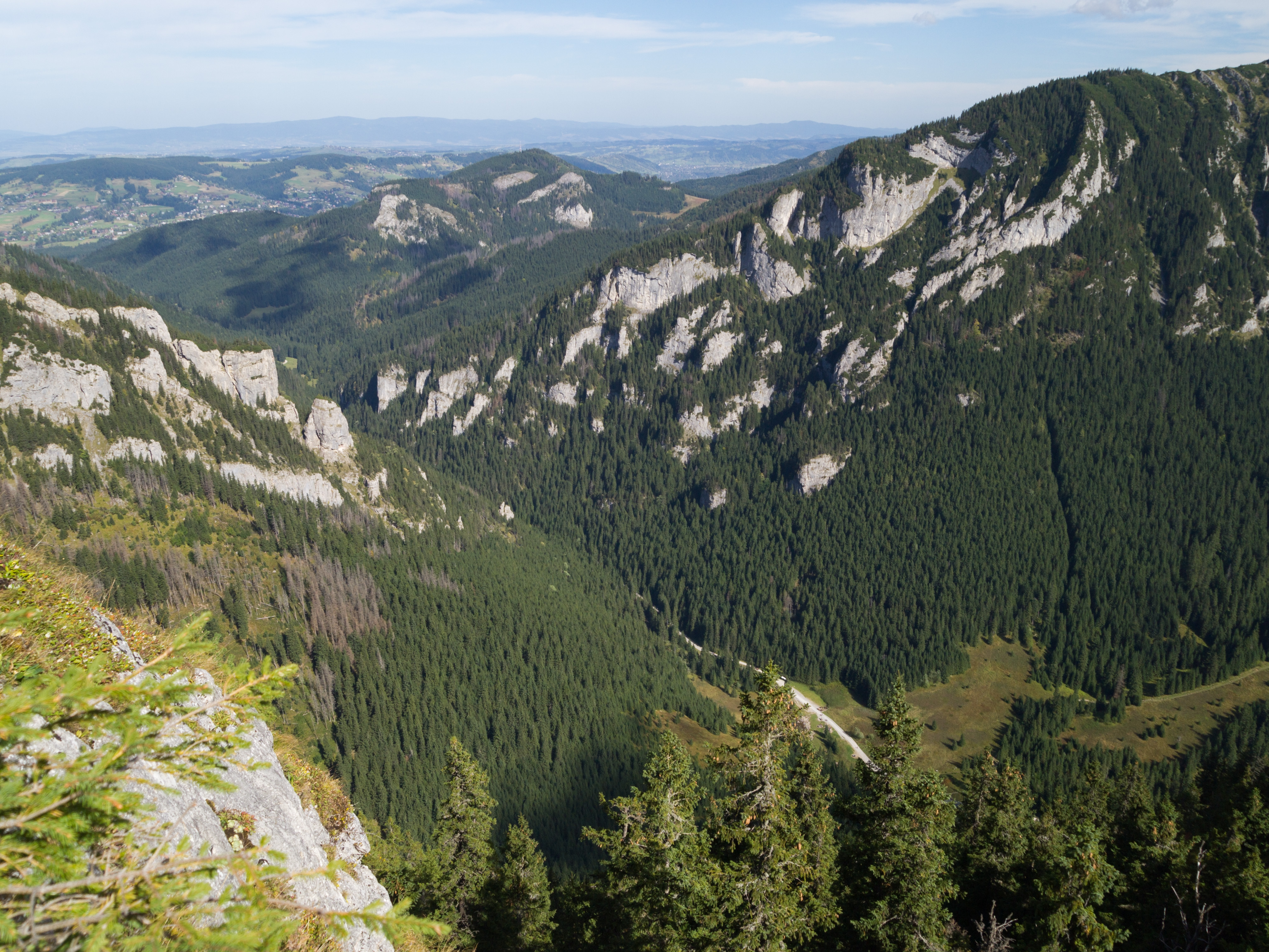 Okolice Organów i Kolistego Żlebu w Dolinie Kościeliskiej, w tle masyw Hrubego Regla.